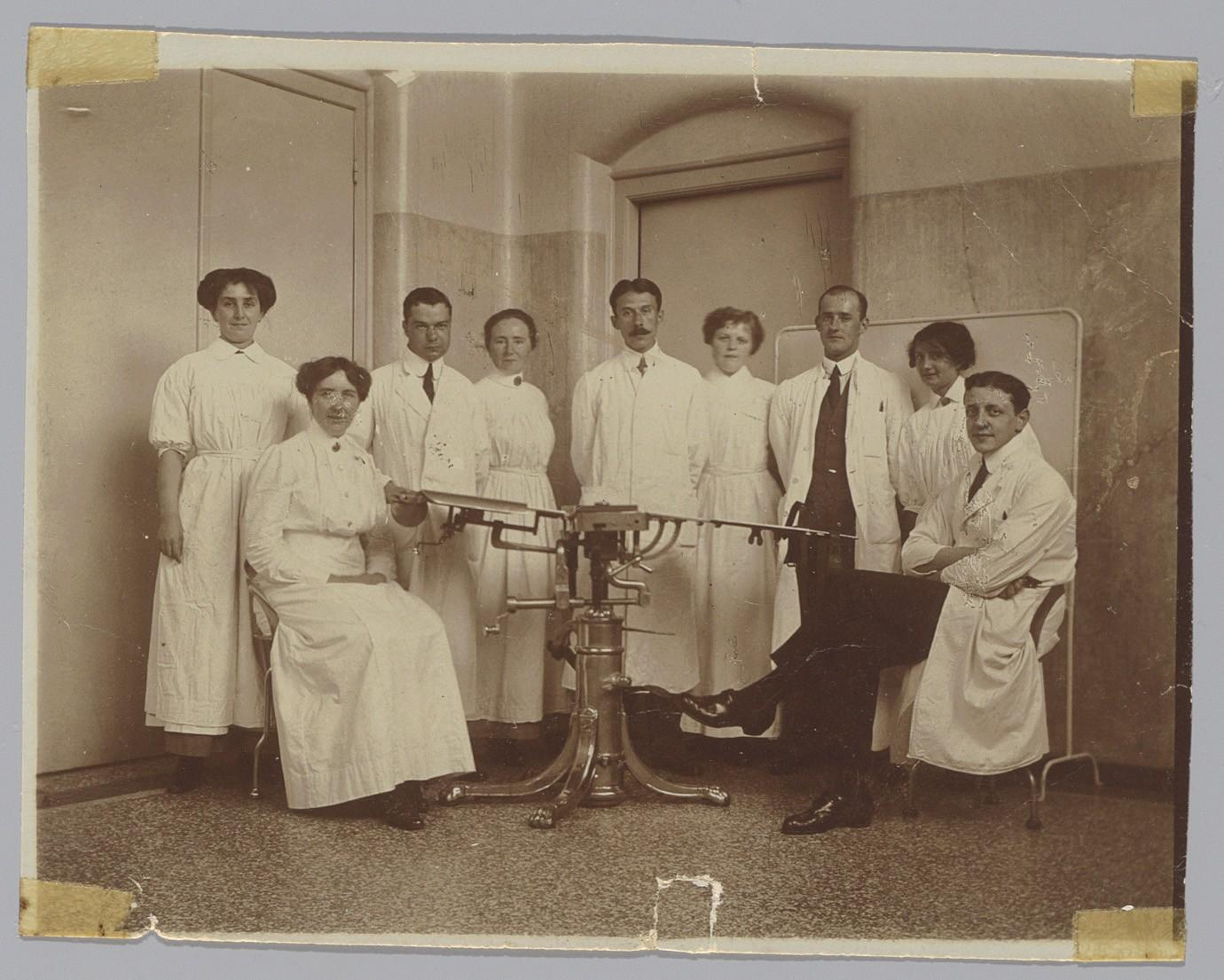 Beschrijving Groepsfoto met medisch personeel van het Burgerziekenhuis, Linnaeusstraat 89 Documenttype foto Vervaardiger Onbekend Anoniem Collectie Collectie Stadsarchief Amsterdam: foto-afdrukken Datering 1900 ca. Geografische naam Linnaeusstraat Inventarissen Afbeeldingsbestand FT00200027000001